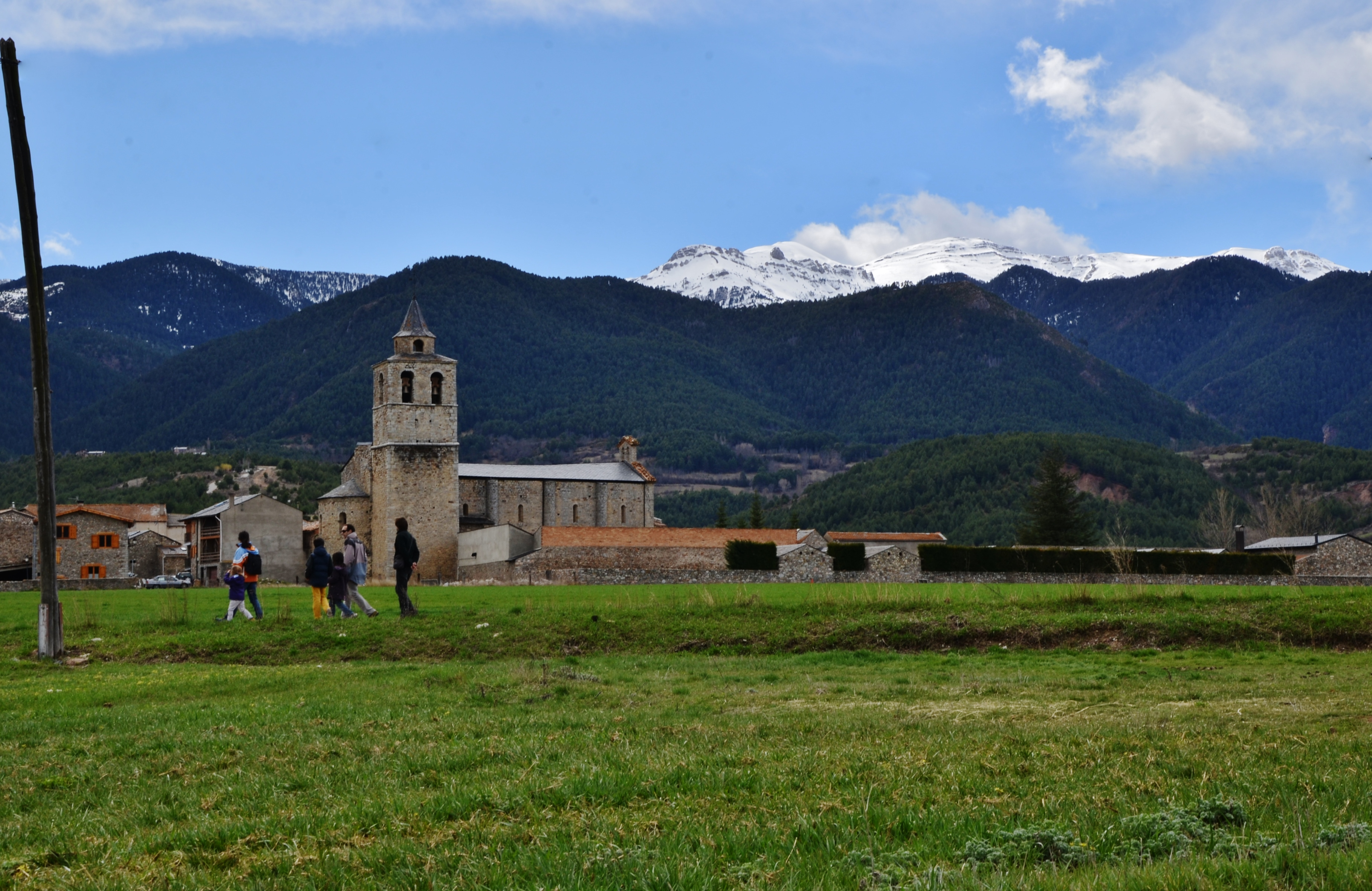 Església de Santa Maria de Talló (Bellver de Cerdanya)